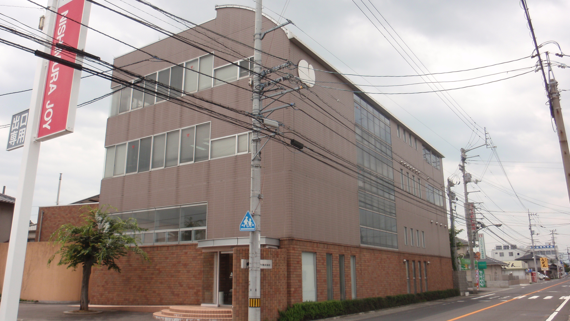 香川県高松市にある西村ジョイ本社。